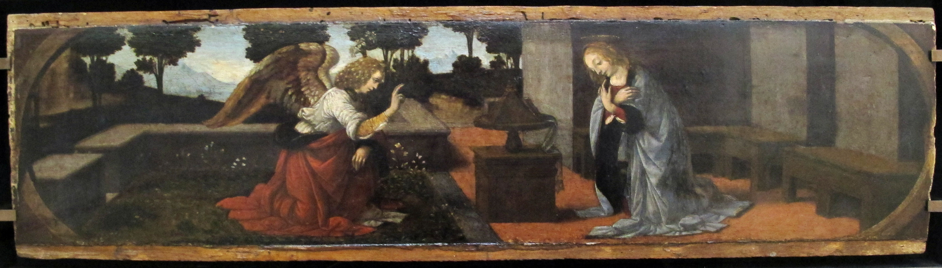 Pittura italiana del Quattrocento al Louvre, Parigi